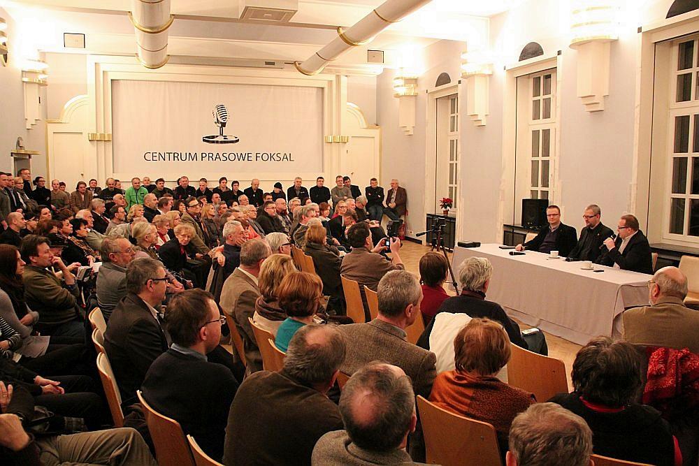 Przegląd Tygodnia w klubie Ronina - 7.01.2013